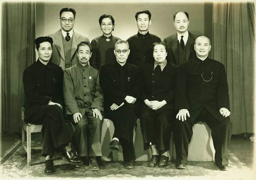 1949年9月，参加政协第一届全体会议的民进代表合影。前排左起：林汉达、周建人、马叙伦、许广平、王绍鏊，后排左起：梅达君、雷洁琼、徐伯昕、严景耀。